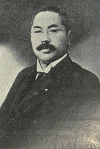 愛甲兼達 あいこうかねさと